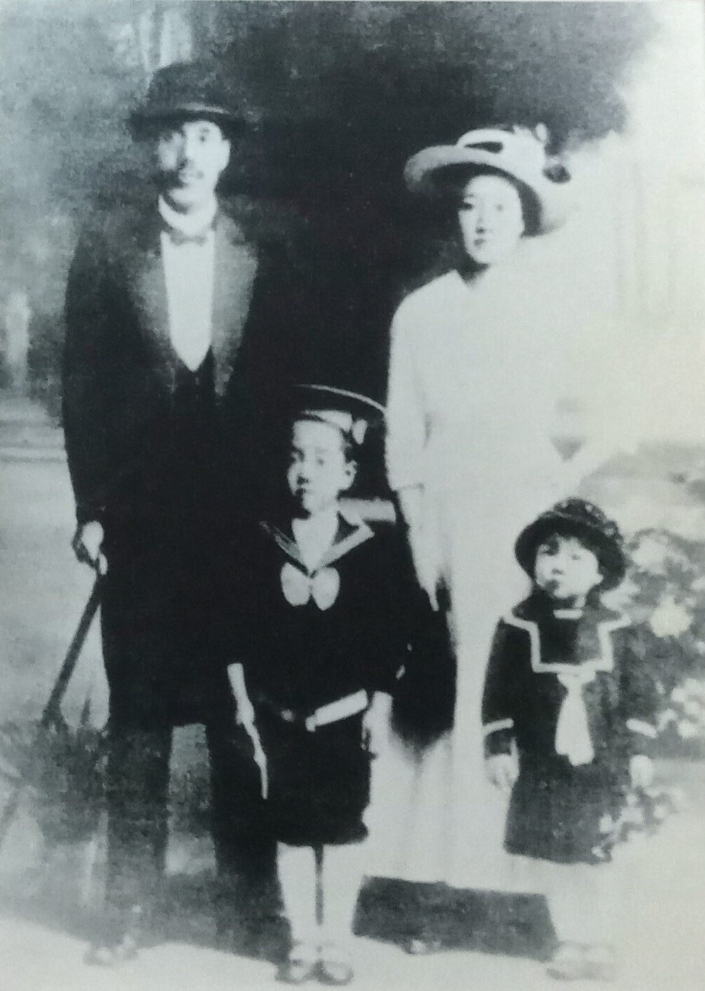 中文（中国大陆）: 大理州博物馆-人像-周钟岳及其家人